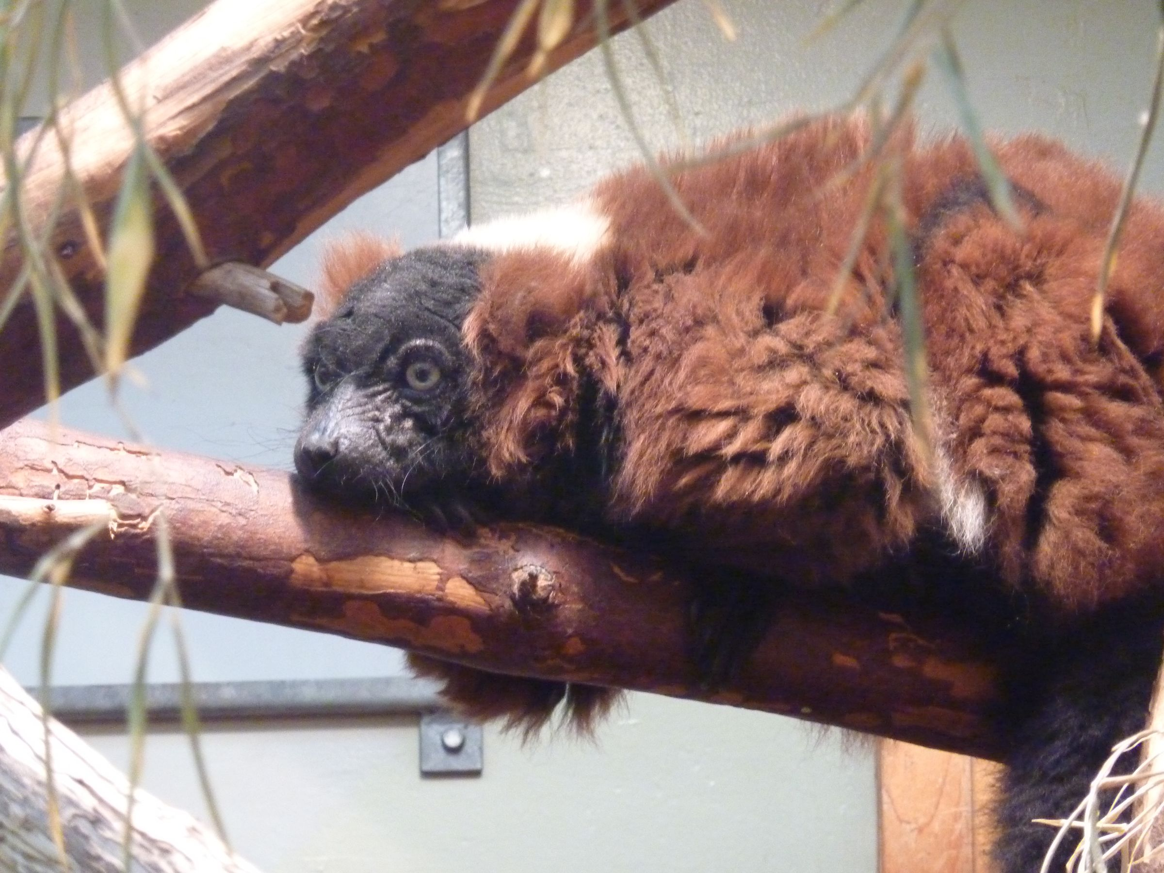 Mascha